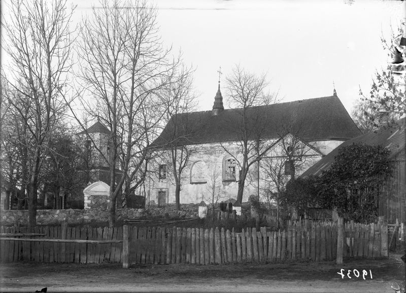 Skapiškio Šv. Lauryno kankinio bažnyčia XIX–XXa.